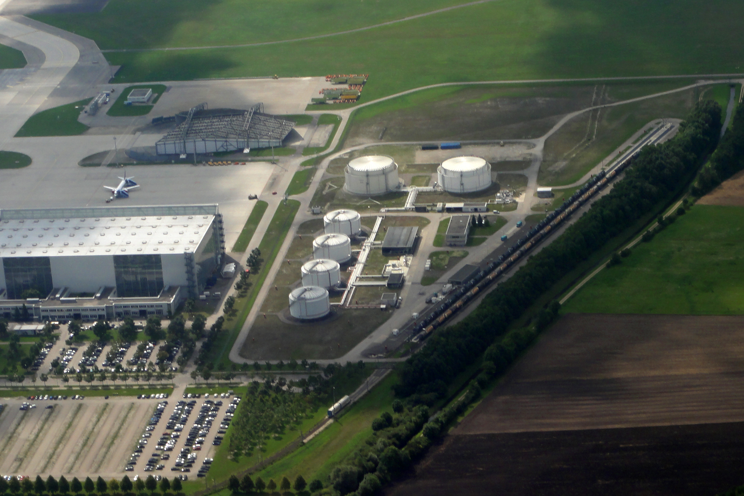 Flughafen München, Kerosintanks und dazugehörige Eisenbahninfrastruktur (Bild bearbeitet: Tonwertkorrektur, Kontrast angepasst, leicht beschnitten)